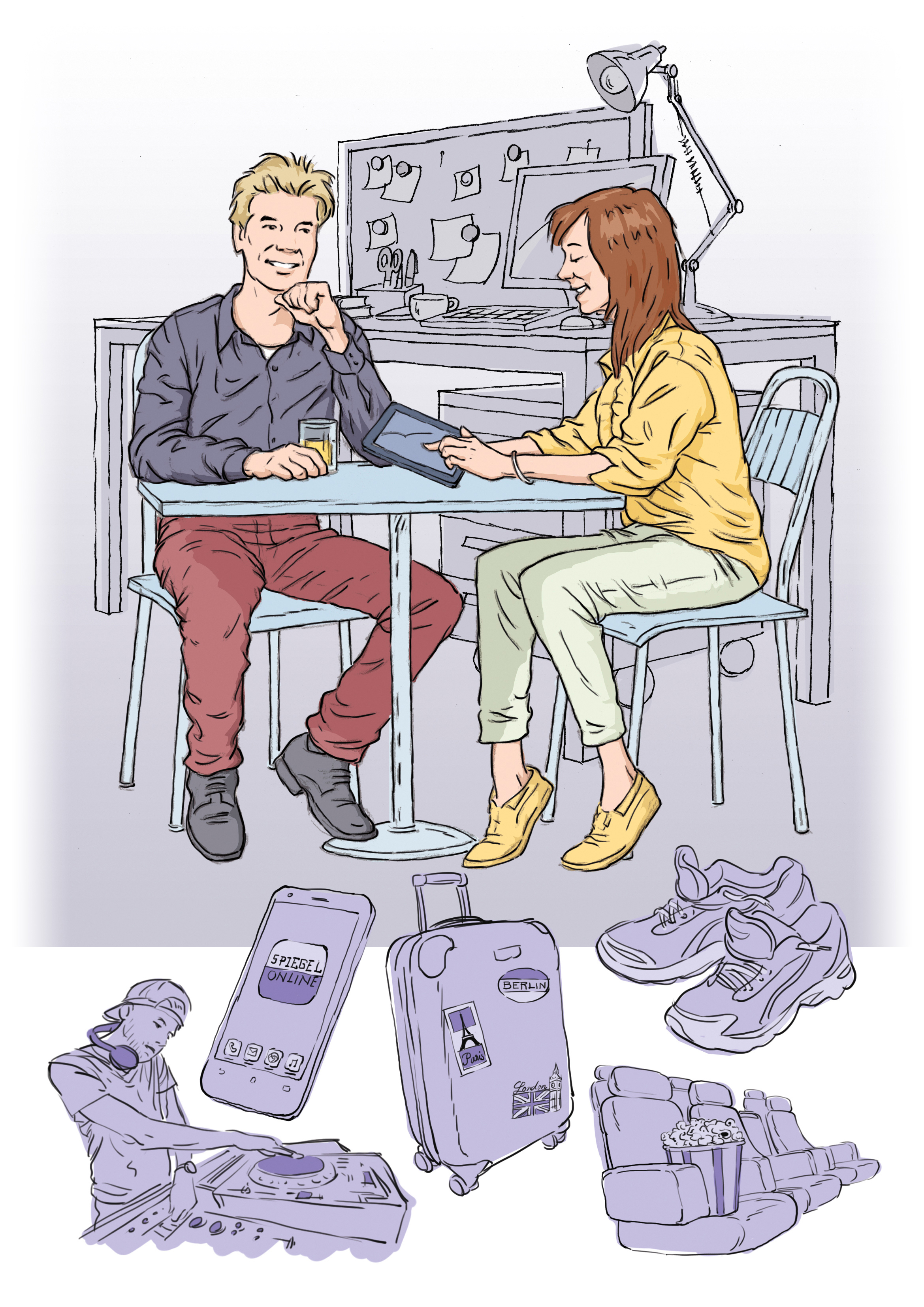 Grafische Darstellung des Typus "Zielstrebige" aus der ARD-/ZDF-MedienNutzerTypologie. Beispielhafte Aussage: "Nur noch 20.000 Mails checken."